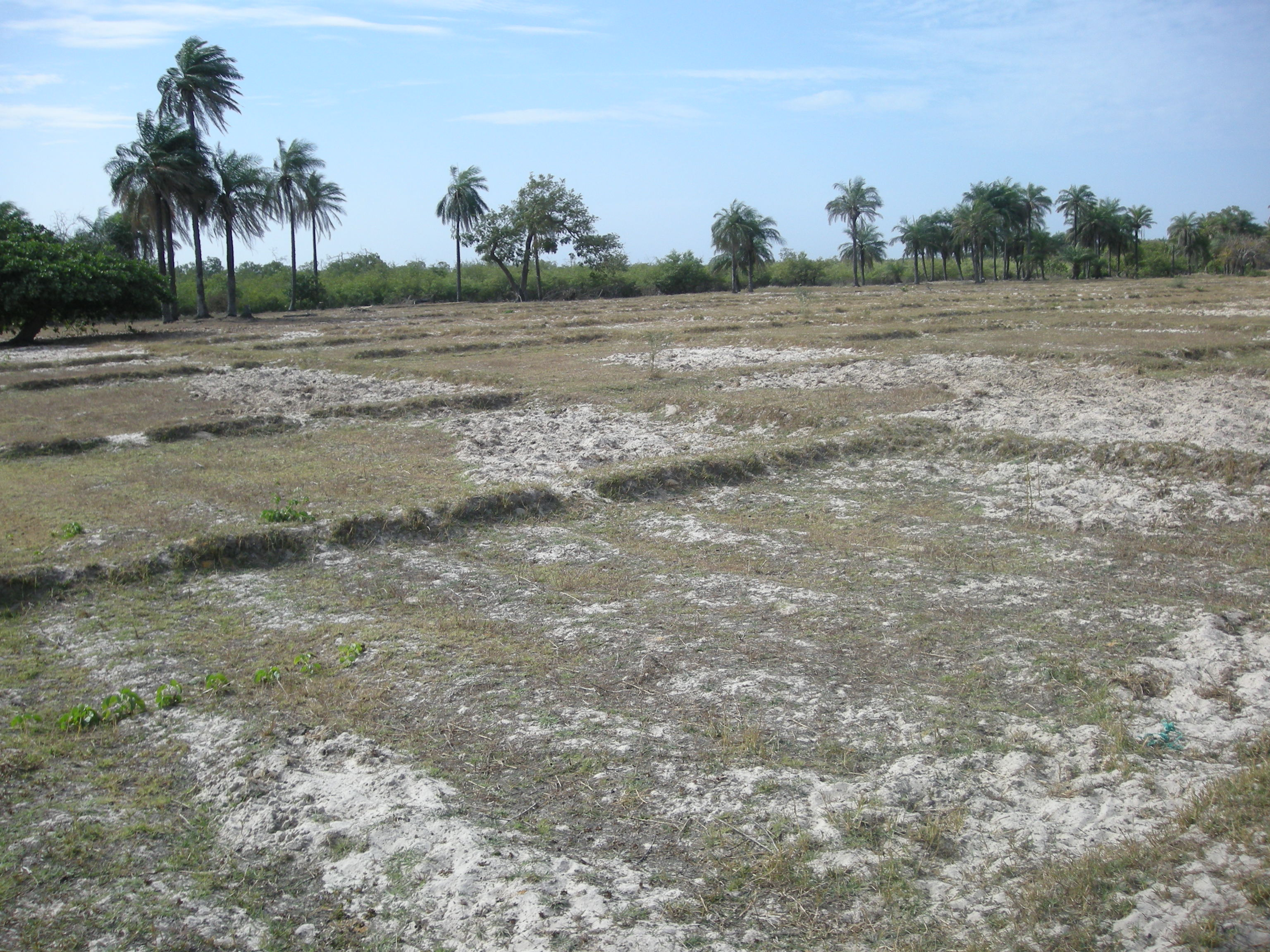 Rizières après la récolte à Carabane (Casamance, Sénégal)